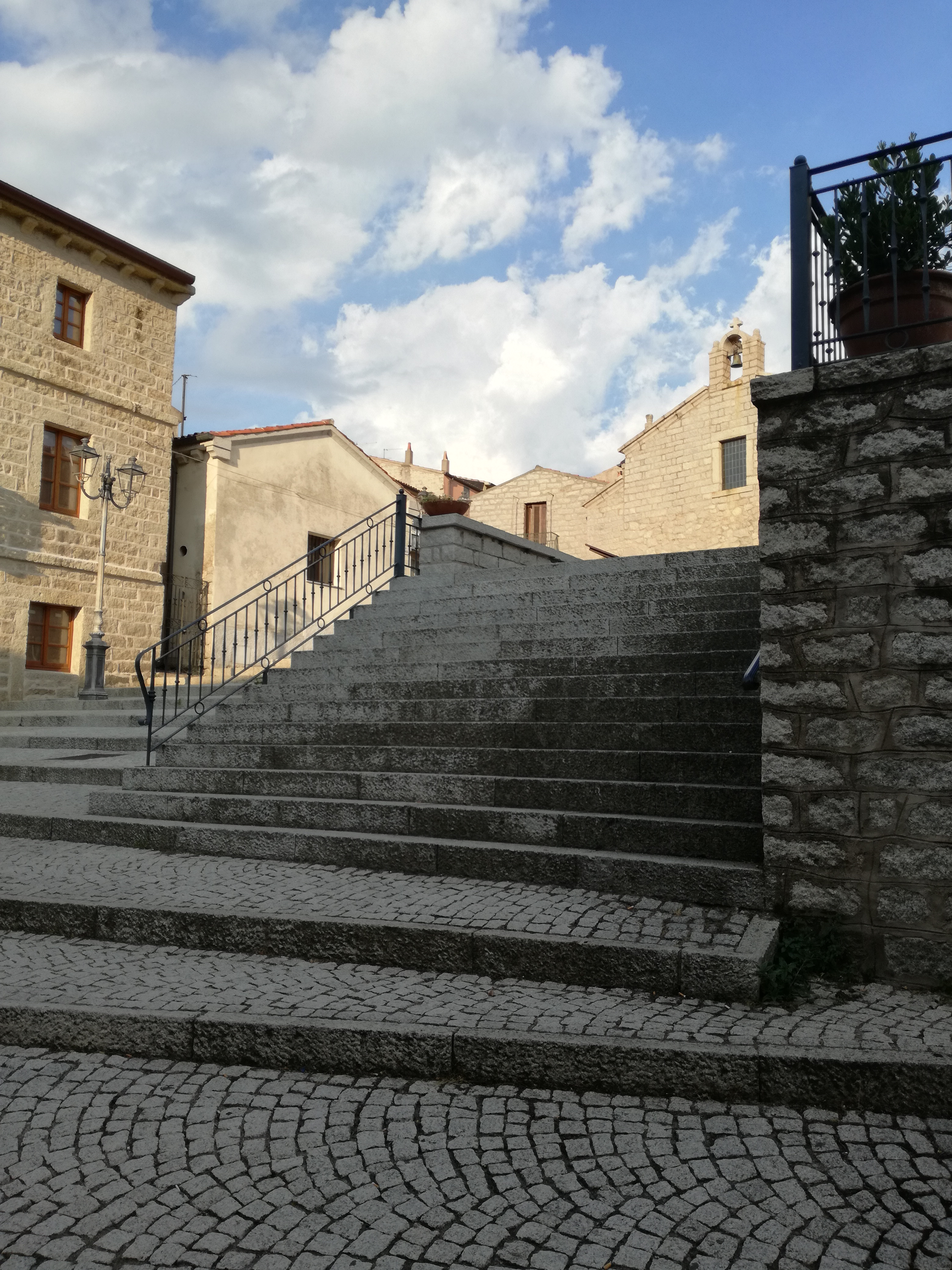 Scalinata granitica della parrocchiale.